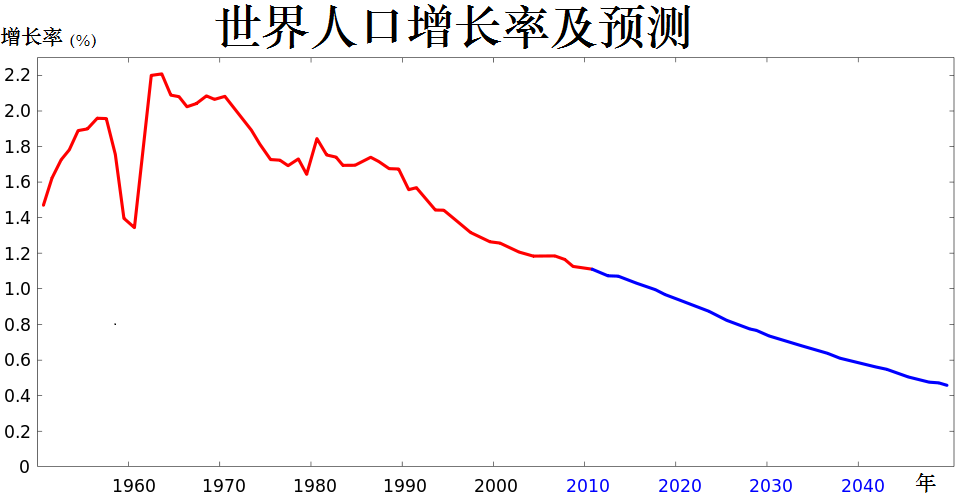 世界人口增長率及預測